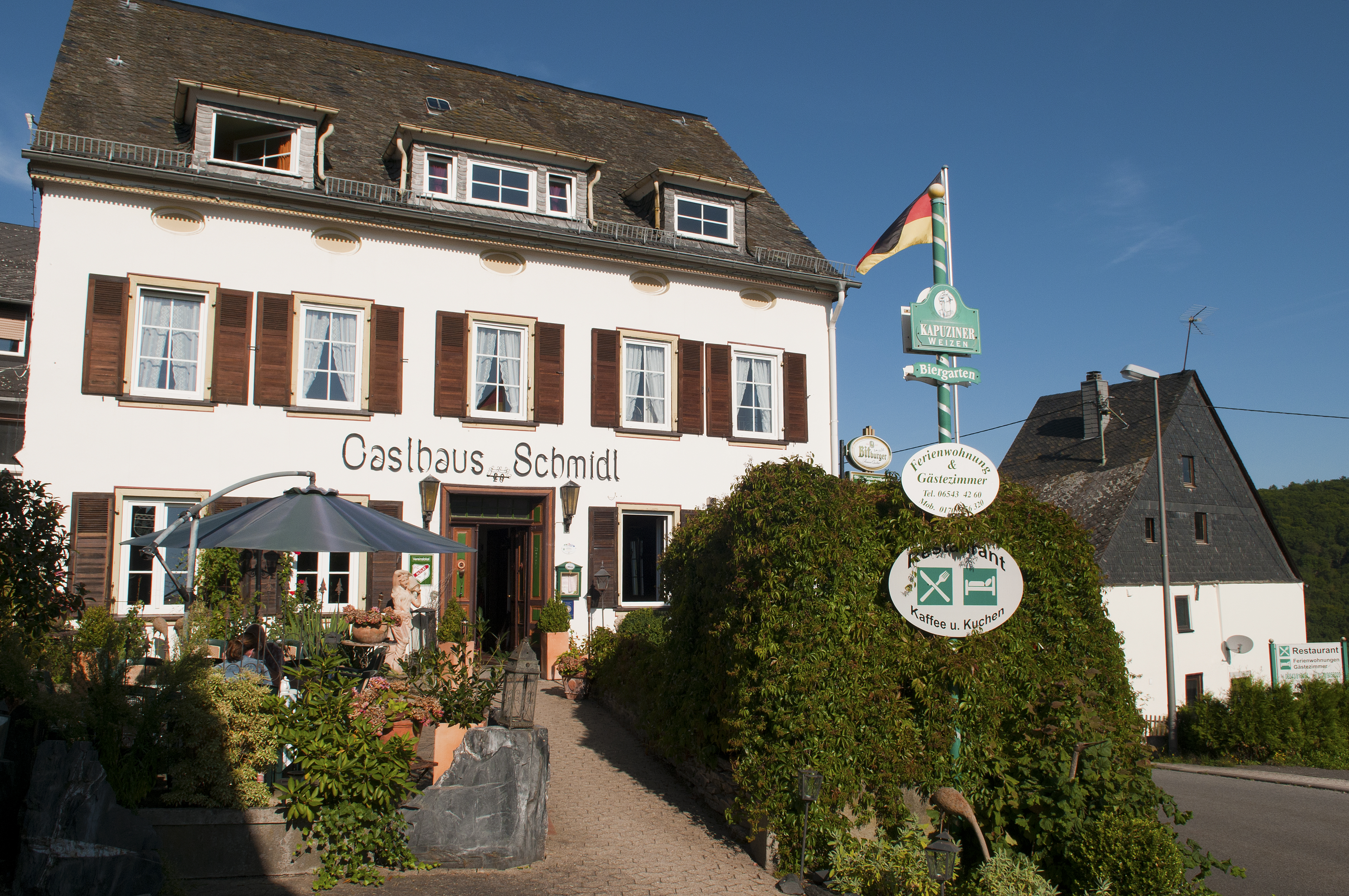 Historisches Landgasthaus Schmidt, Altlay